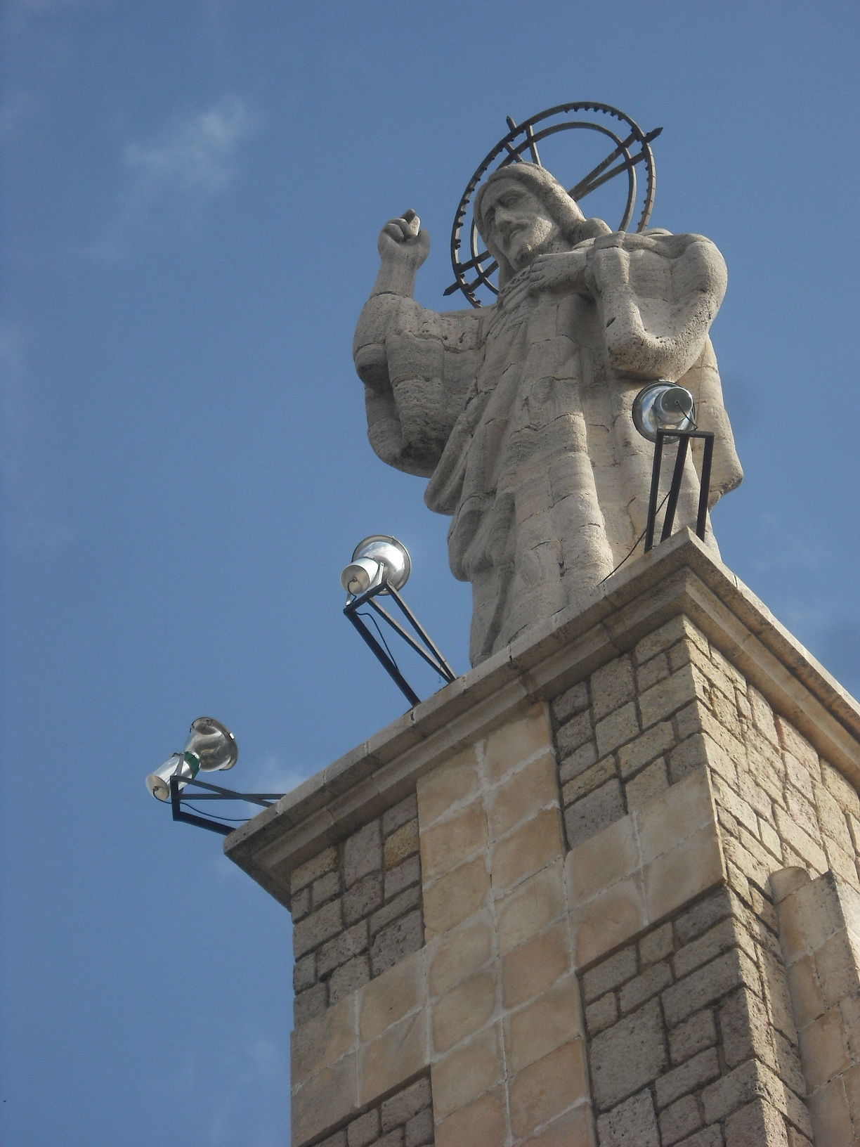 Cristo del Socorro.